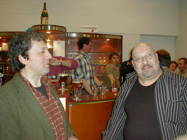 Pierre Otjacques (left) with William Dunker (right) at Bièvre. Walon: Pierre Otjacques (a hintche) ki boet ene cråsse pinte avou William Dunker a Bive å concert après l' prezintaedje di troes lives e walon del Rantoele et do Muzêye do Pårlaedje e l' Årdene (portrait saetchî pa L. Mahin).